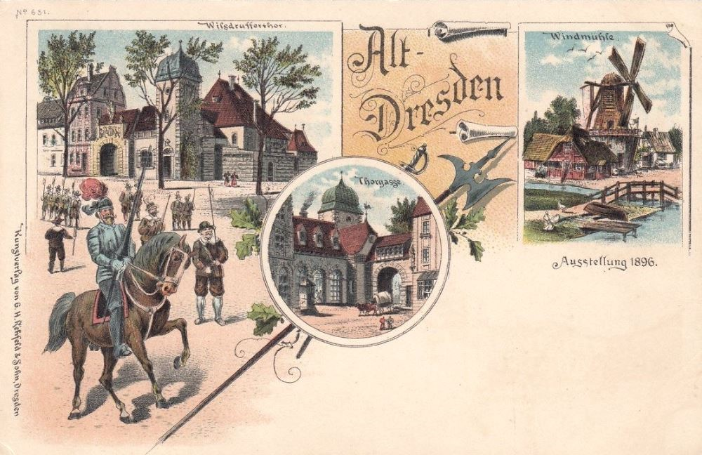 La exposición sajona en Dresde, el arte y las artes aplicadas, 1896.